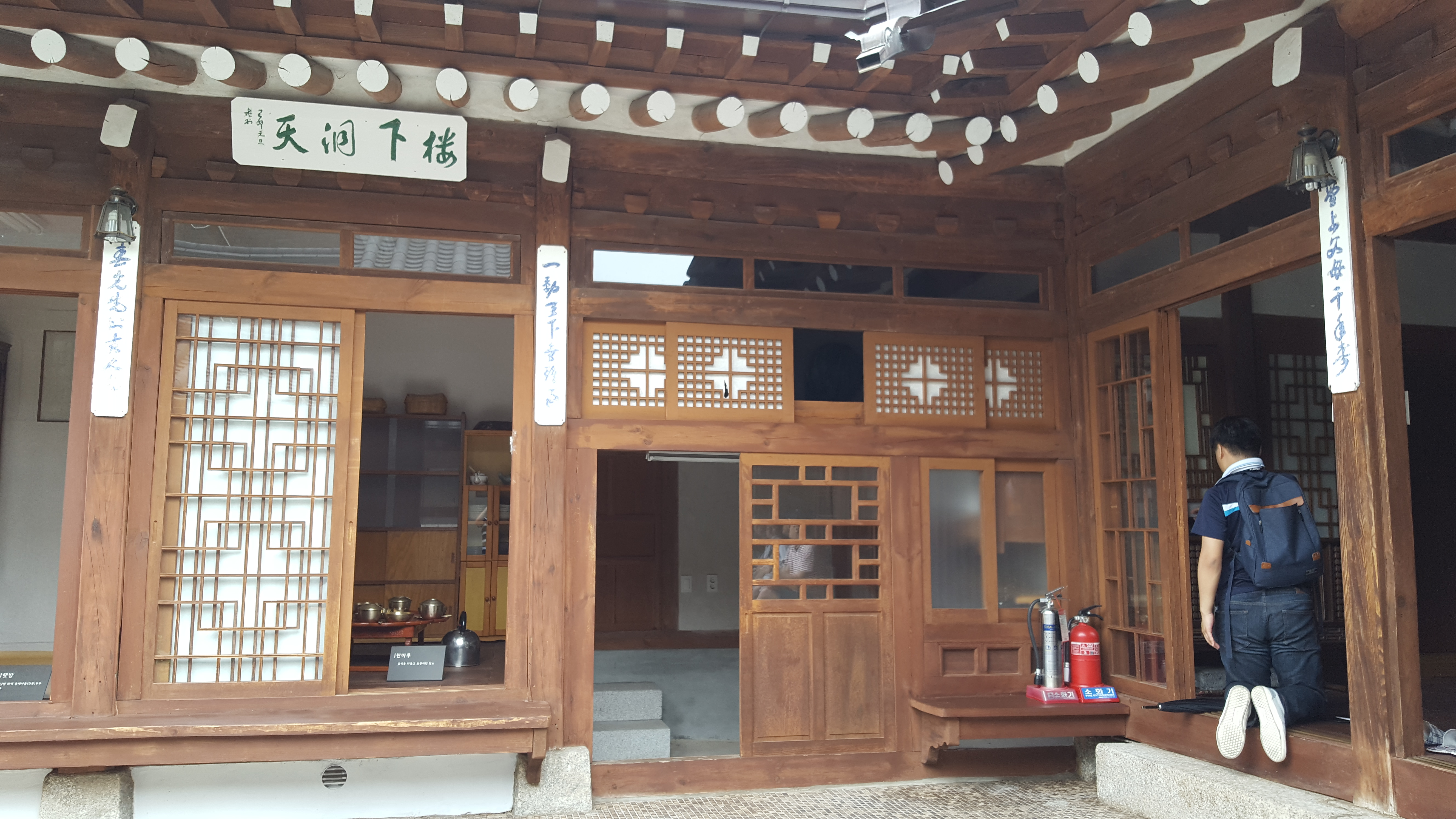 이상범 가옥 사진